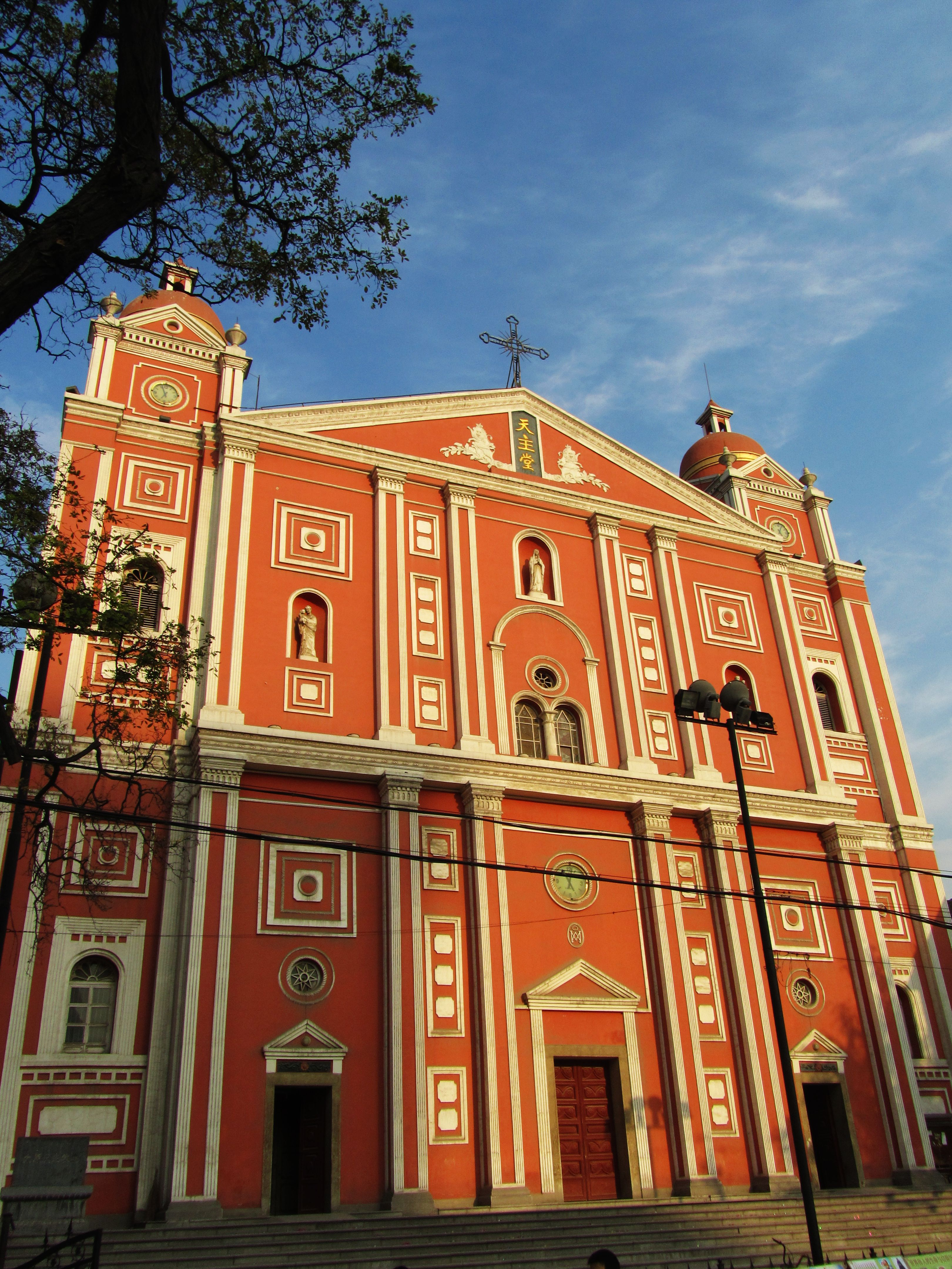 太原圣母无染原罪主教座堂，西立面。